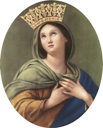 Madonna della Misericordia, si venera nella Chiesa di S. Chiara - Rimini ufficiata dai Missionari del Preziosissimo Sangue.